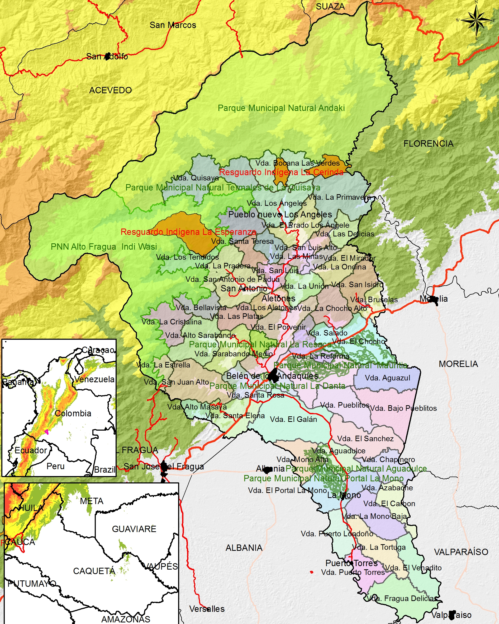 Localización general Belén de los Andaquíes.